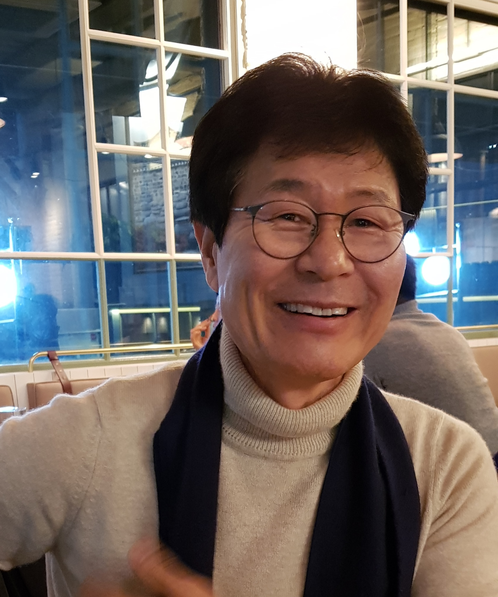 협성대학교 김영선 교수